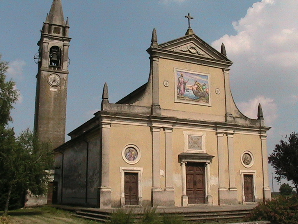 Stilo de' Mariani - Chiesa di Sant'Andrea Apostolo